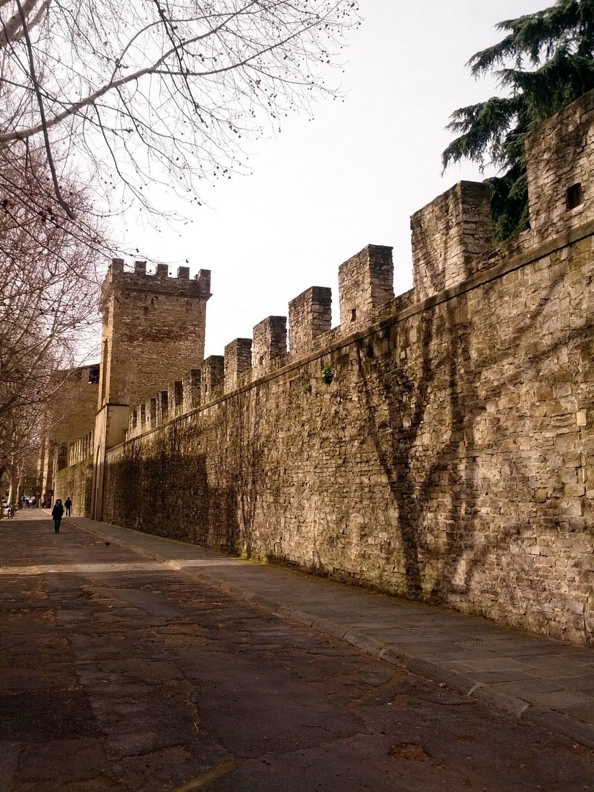 Il tratto di mura in via Lungo le mura di Santa Rosa o piazza di Verzaia[1]